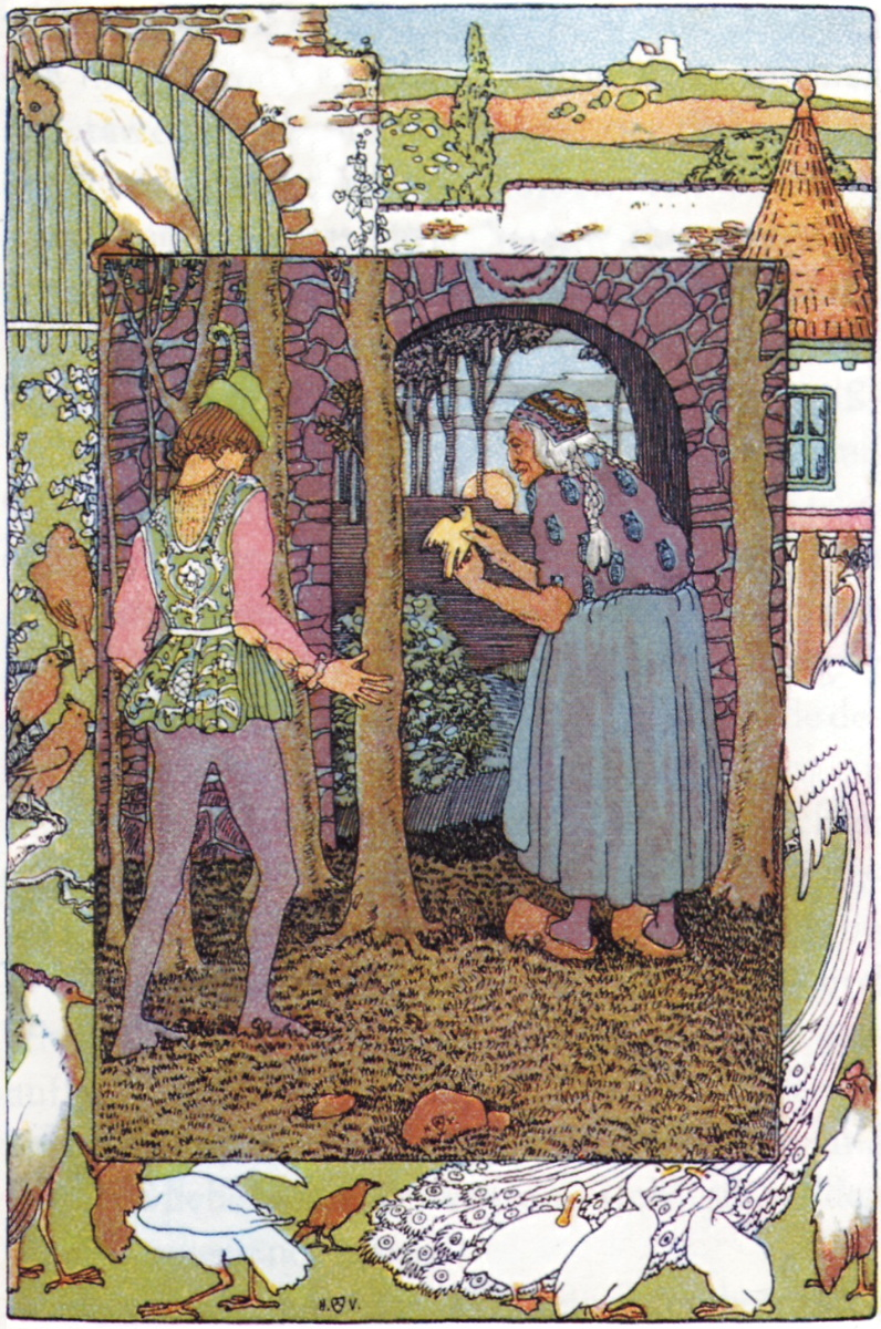 Illustration des Grimm'schen Märchens „Jorinde und Joringel“ (KHM 69) von Heinrich Vogeler